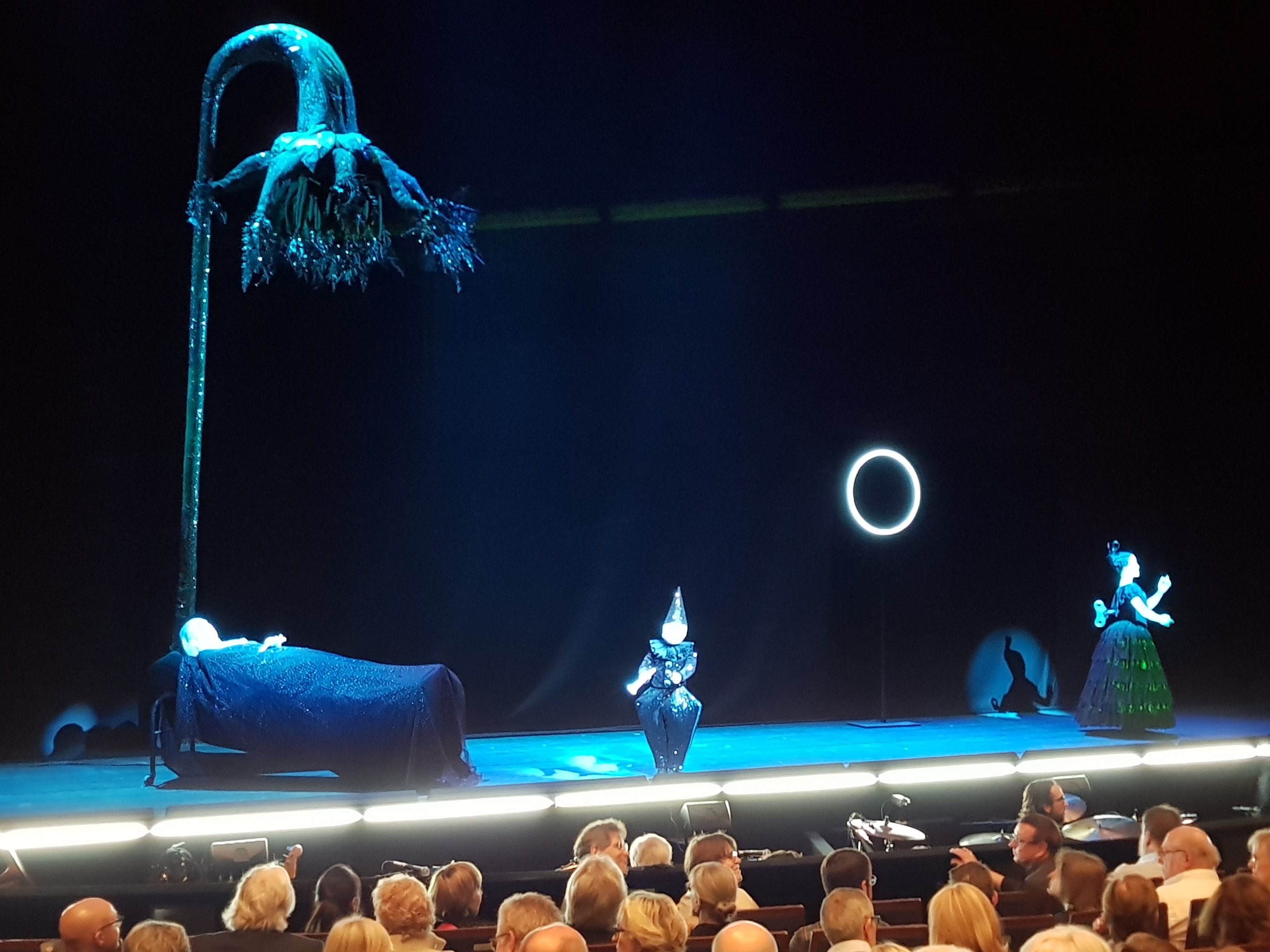 "Der Sandmann"-Inszenierung von Robert Wilson 2017 im Düsseldorfer Schauspielhaus